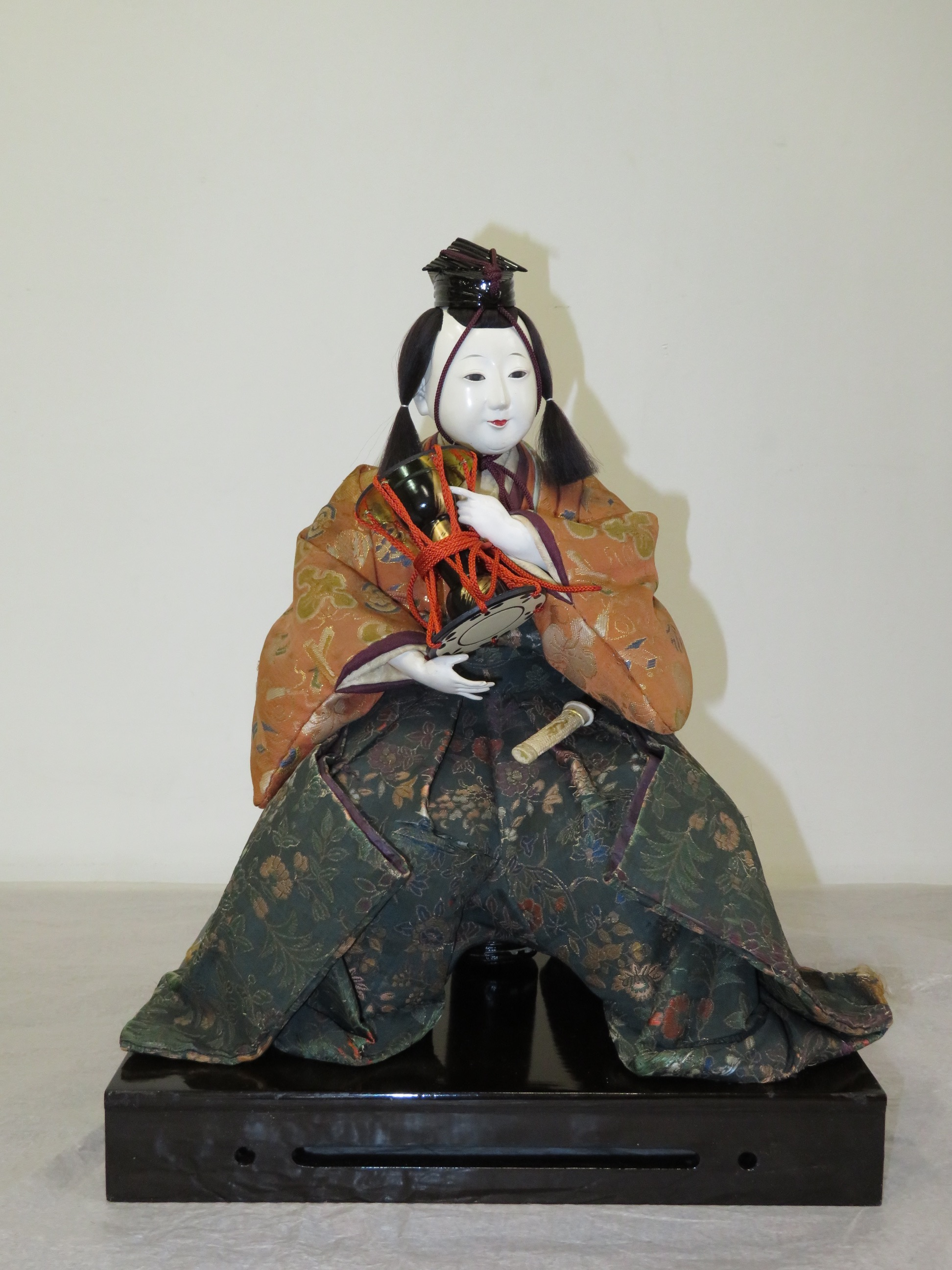 2018年2月27日-3月18日 東京国立博物館展示風景